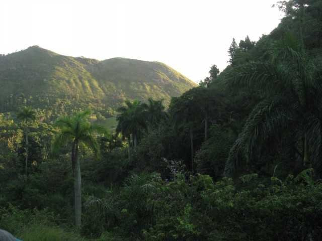 El Nicho, Cuba